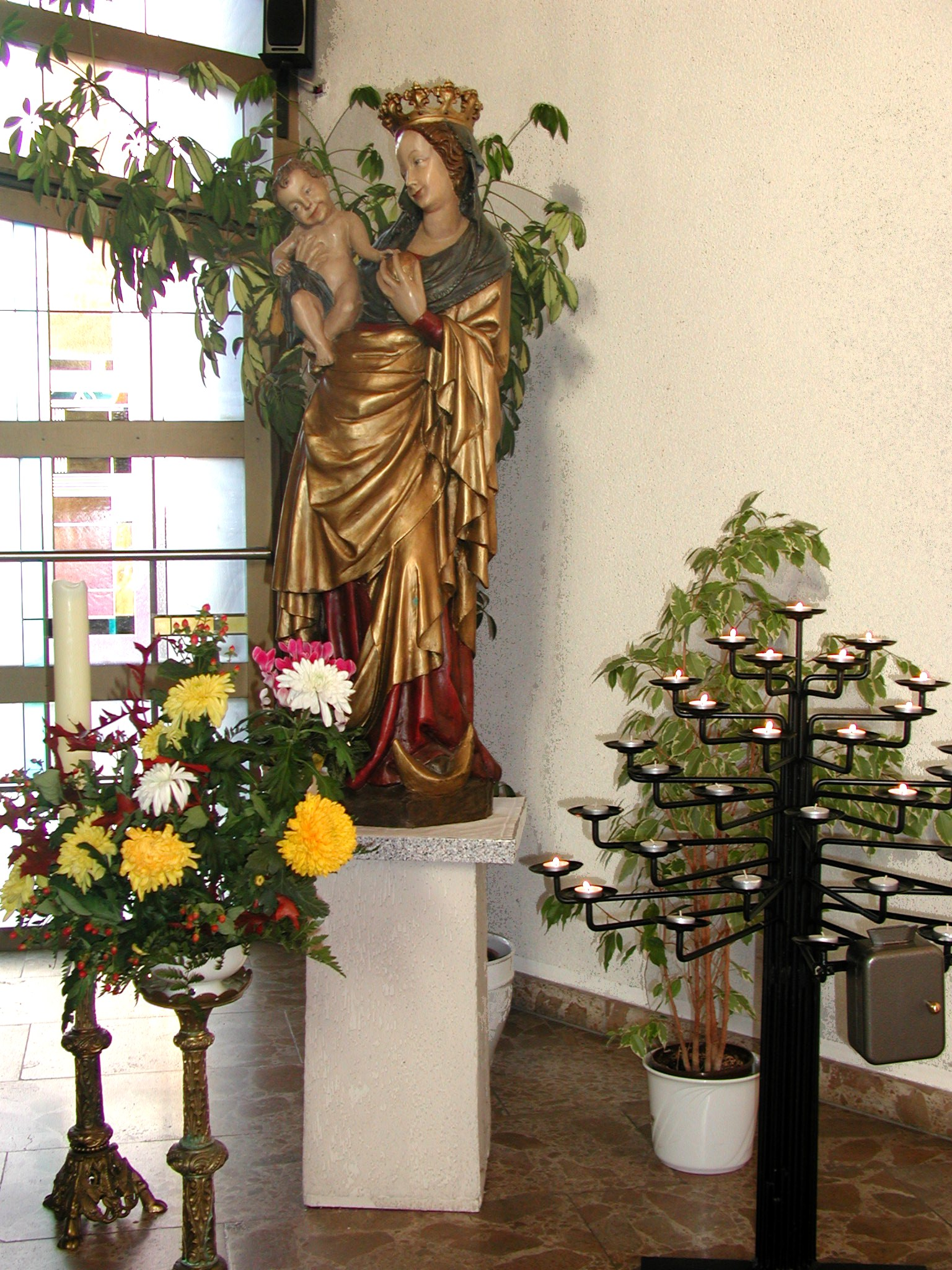 Marienstatue in der Kirche zum Guten Hirten in Friedrichsfelde.